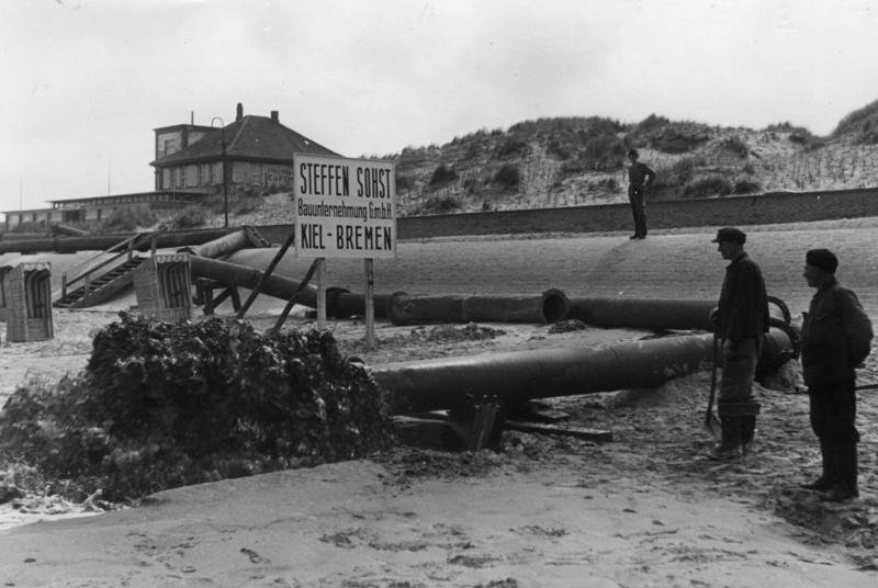 Norderney, Anschwemmung von Sand Hier entsteht ein neuer Badestrand Mit Hilfe einer riesigen Rohranlage wird im Nordseebad Norderney ein neuer Badestrand angeschwemmt, nachdem durch die Winterstürme der bisherige Strand fast völlig fortgespült worden war. Rieseige Fontänen aus Wasser und Sand ergiessen sich aus dem Rohrmund. 23-6-49 Illus.dpd 3493-49